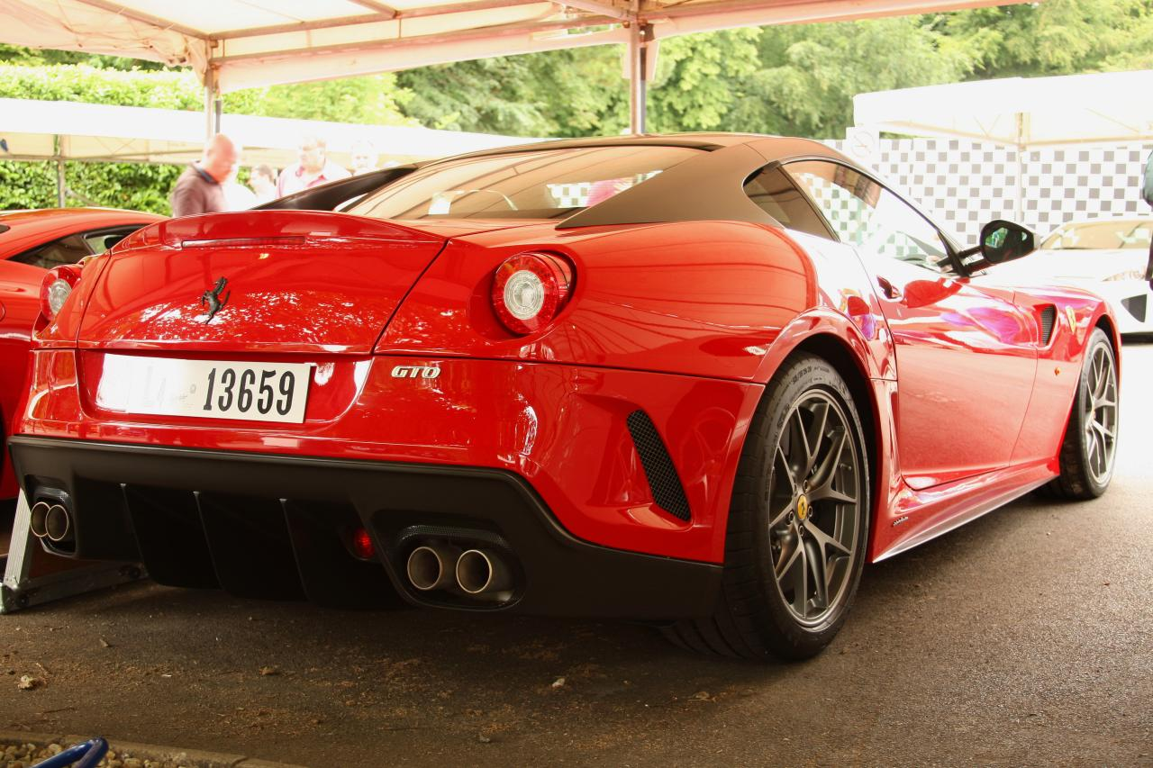 Ferrari 599 GTO